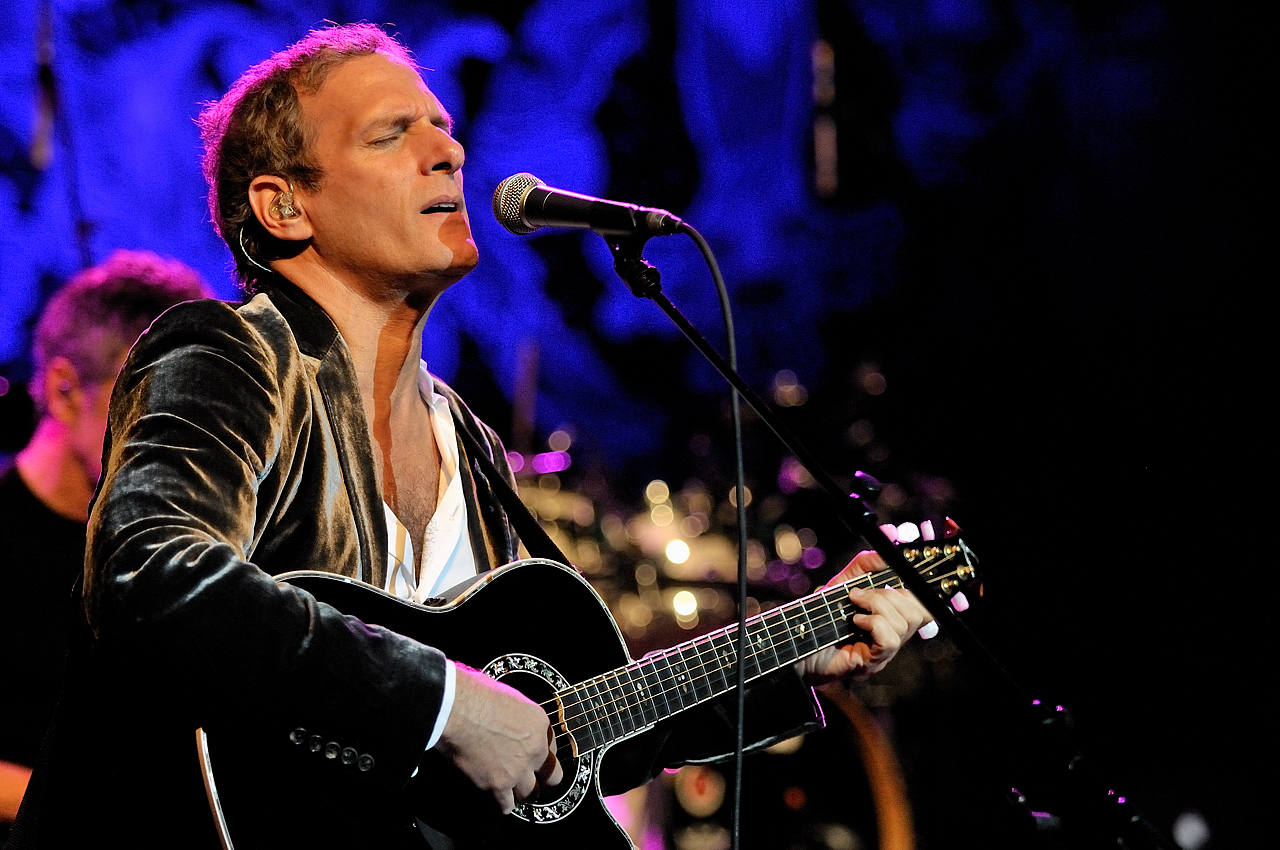 Michael Bolton en el Palau de la Música de Barcelona el 14 de enero de 2010